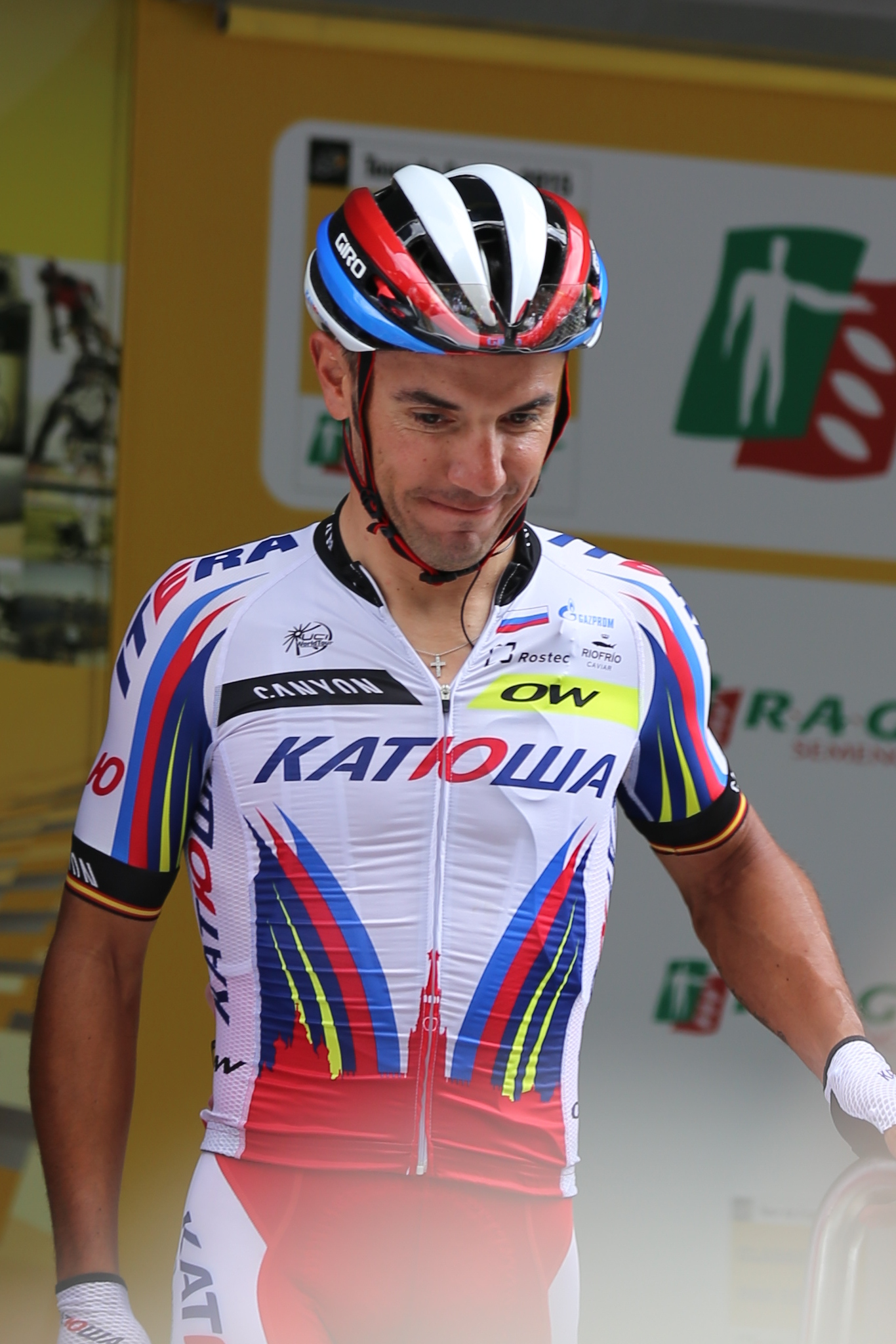 Joaquim Rodríguez lors du départ de la 8e étape du Tour de France 2015 à Rennes.